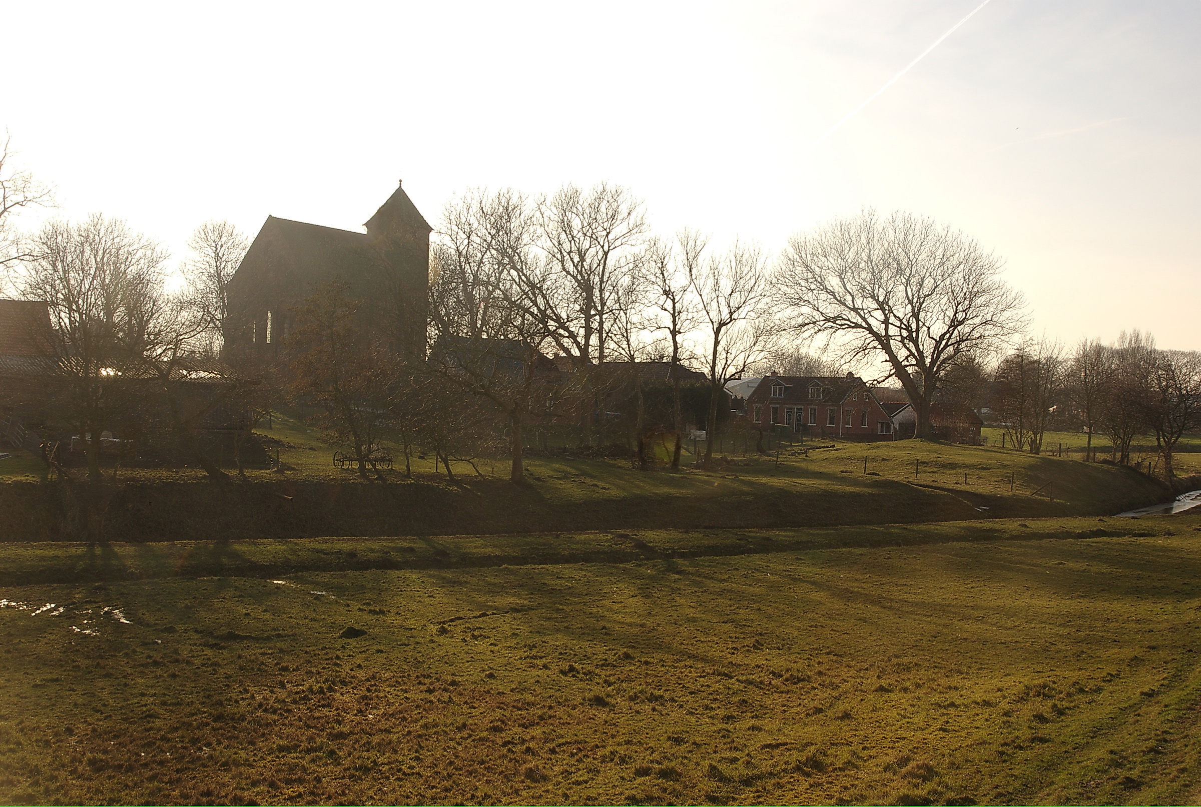 Wierde Termunten